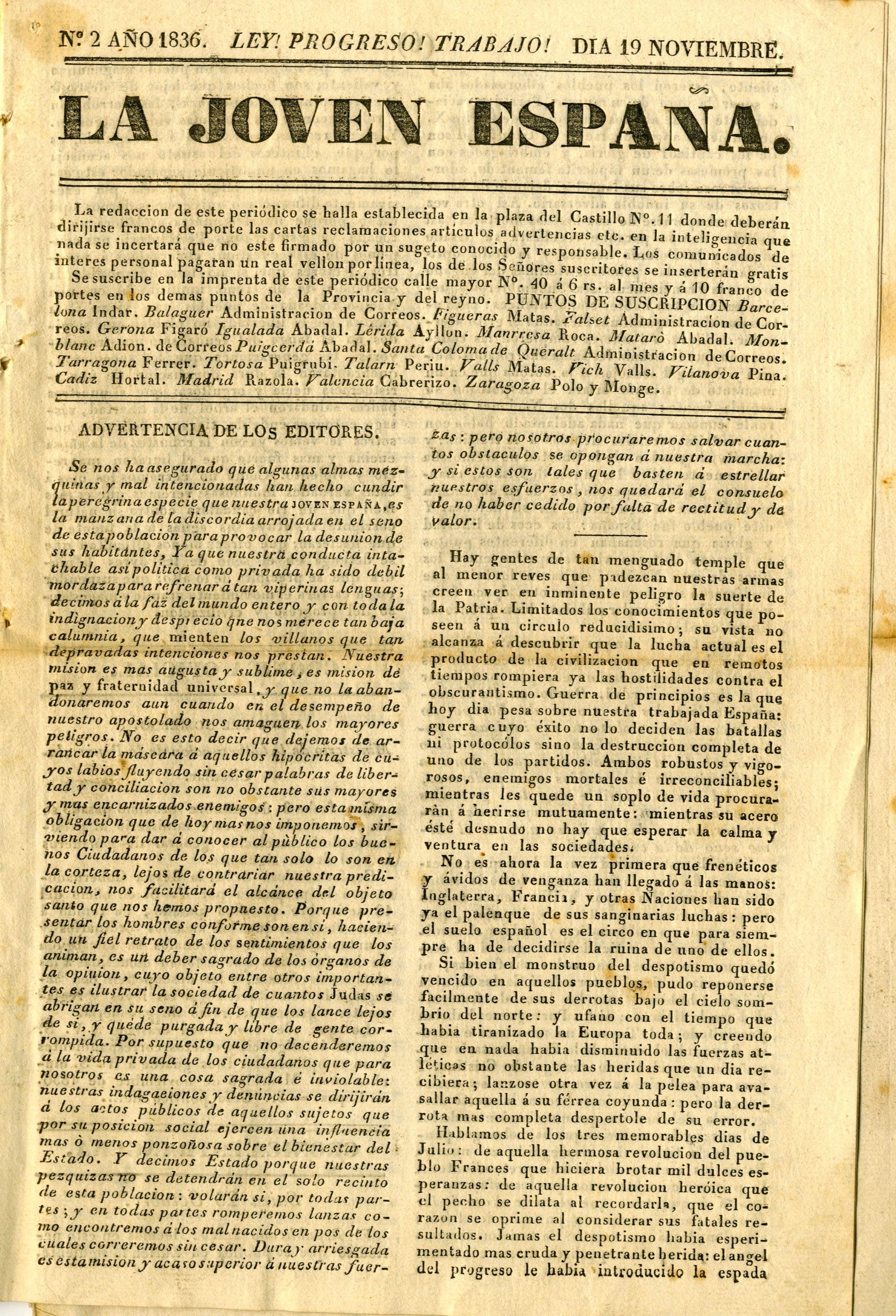 Primera pàgina del núm. 2 de La Joven España. 1836